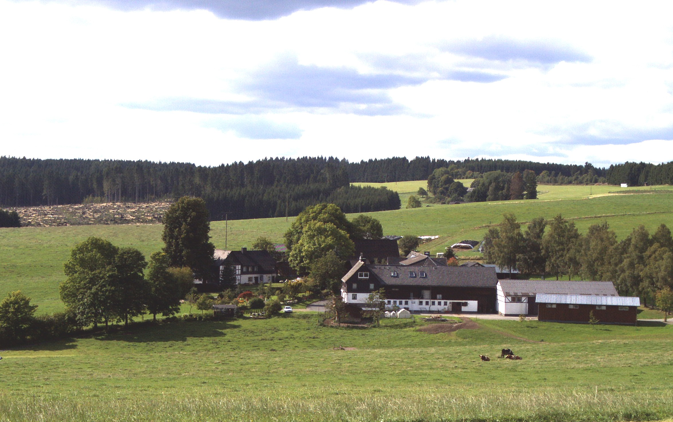 Teiche